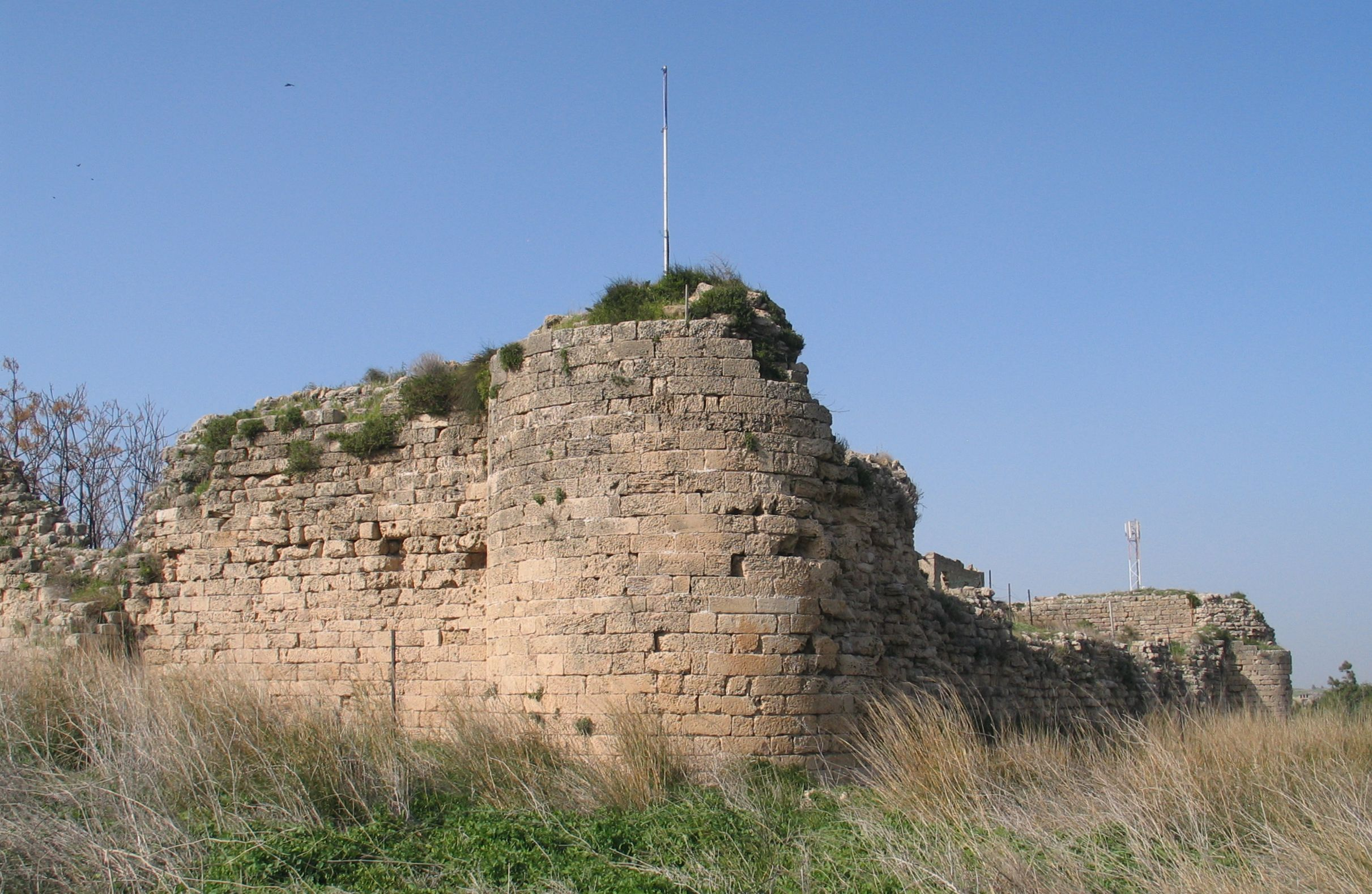 Cafarlet Fortress, moshav HaBonim, Israel.